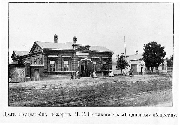 Дом трудолюбия в Таганроге